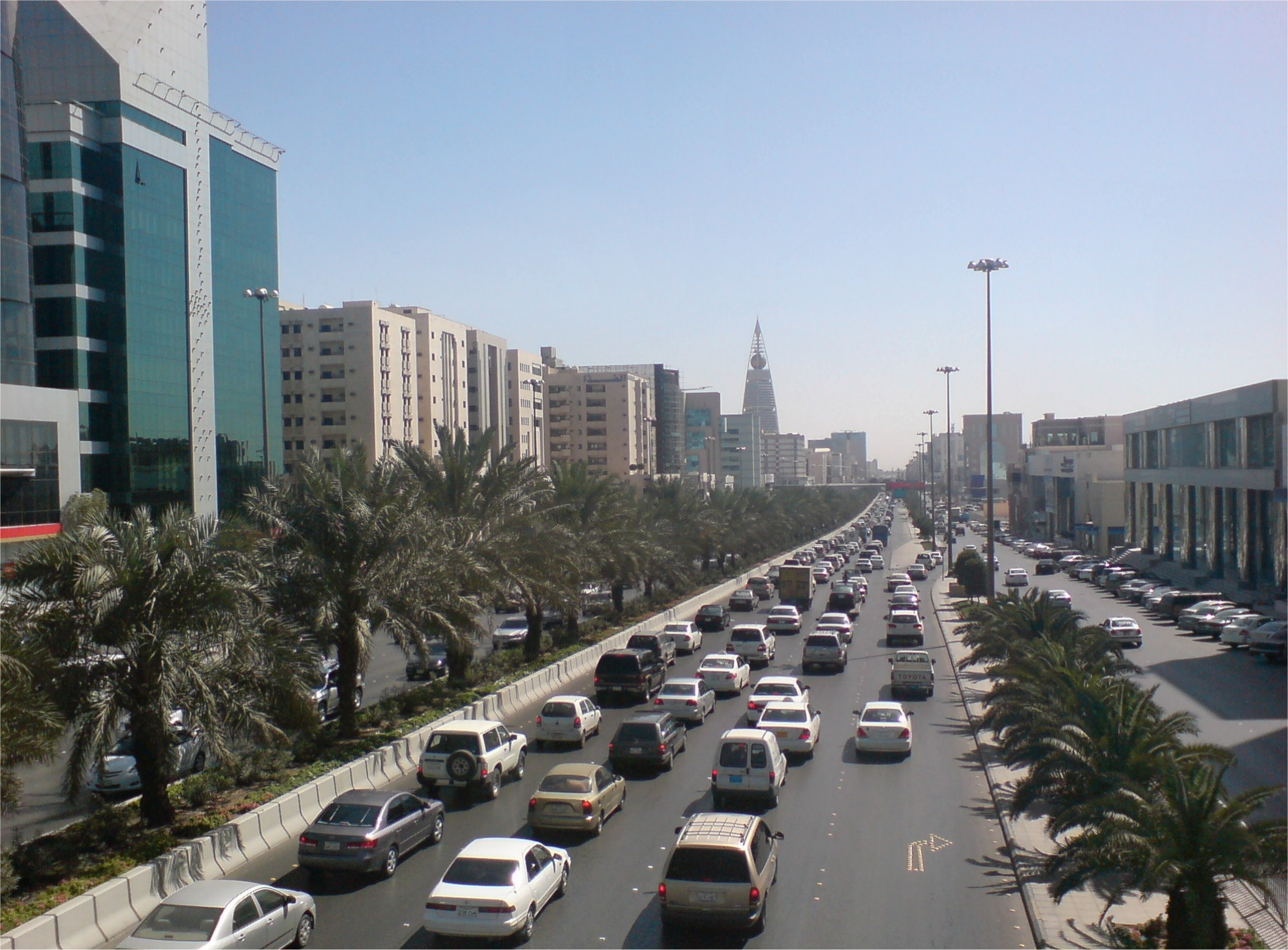 King Fahd Road - Riyadh, Saudi Arabia